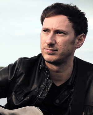 Leo Spauls under filmandet av musikvideon "Allt det som är du" 2016.